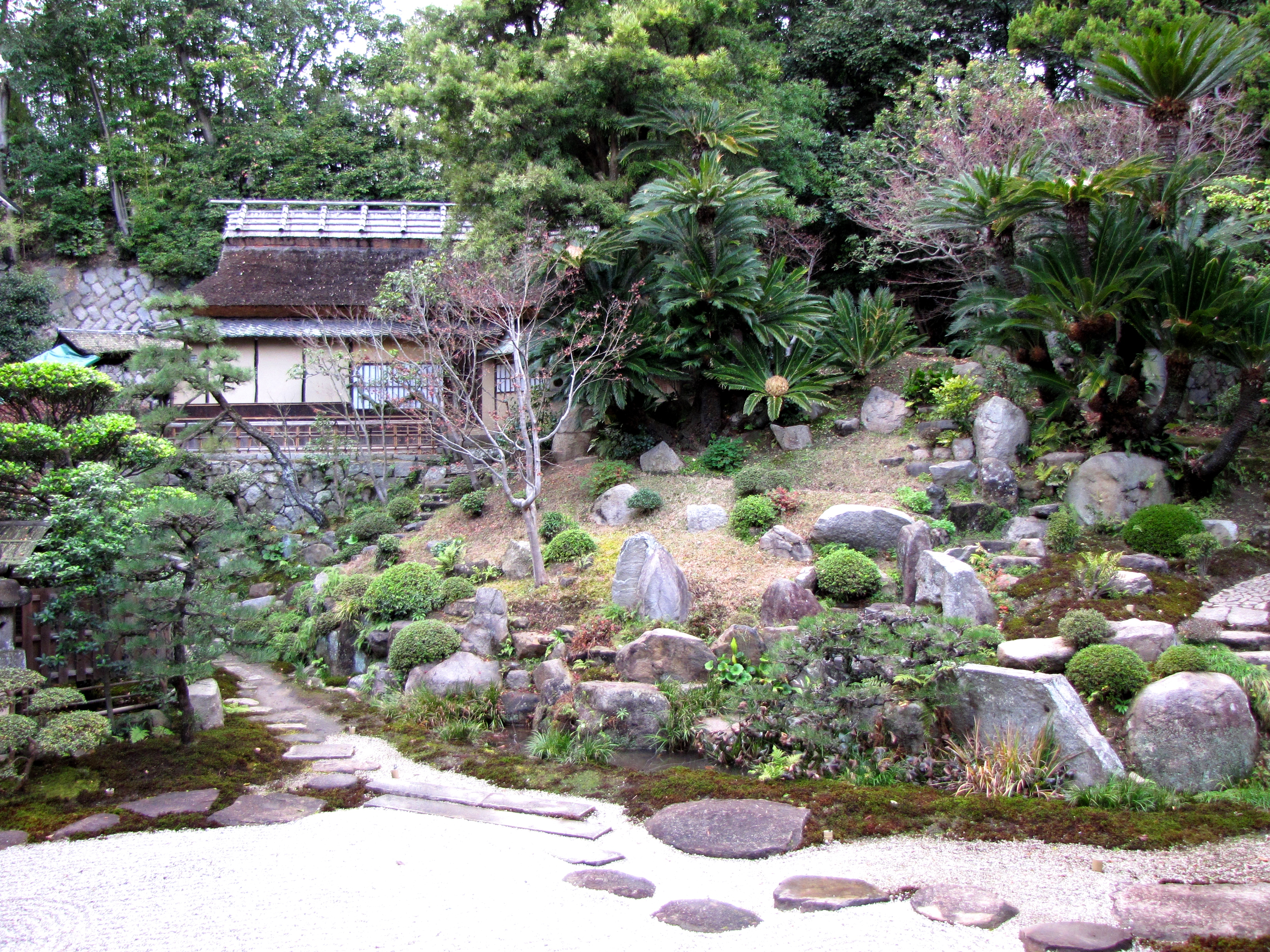 広島県尾道市の浄土寺庭園と露滴庵。